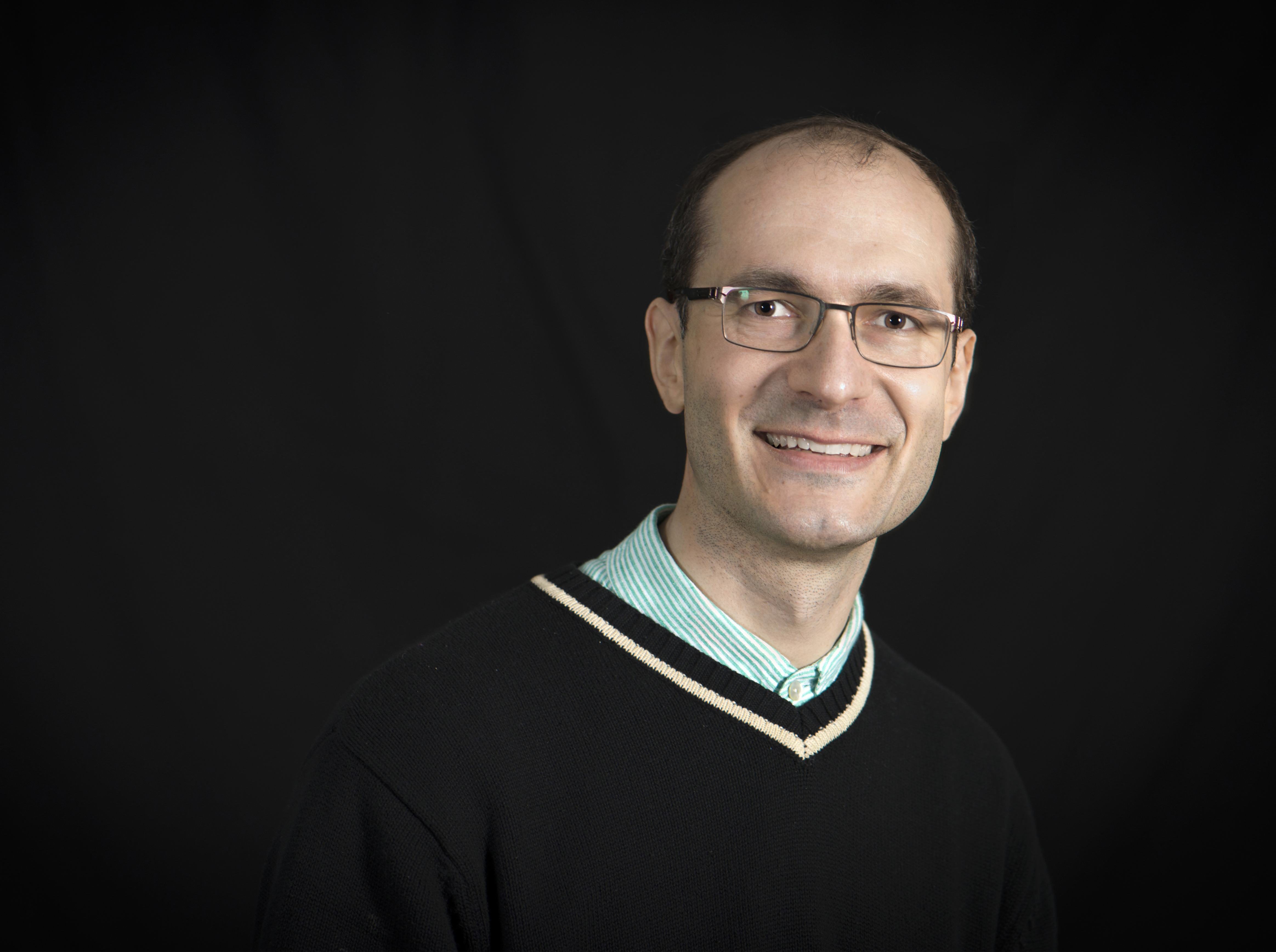 Portrait d'Alexis Michaud, chercheur au CNRS, réalisé pour une exposition photo « Regards sur la recherche ».